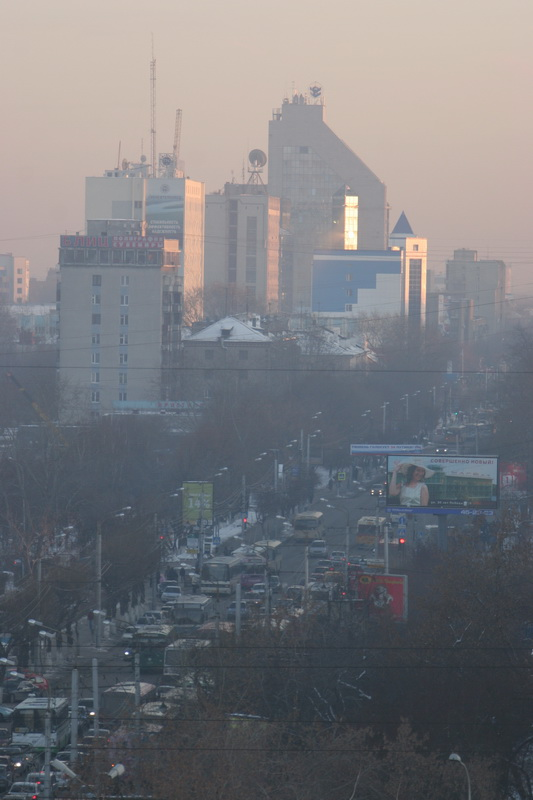 Улица Республики в Тюмени в районе Текутьевского бульвара.